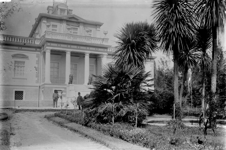 Palacio de La Circasiana, fachada este. Fotografía de 1920.